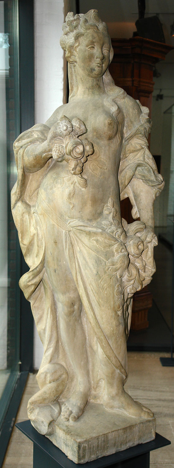 Focke-Museum Bremen: Flora (Allegorie des Frühlings), um 1750. Oberkirchener Sandstein. Ausführung: Theophil Wilhelm Frese (1696-1763)